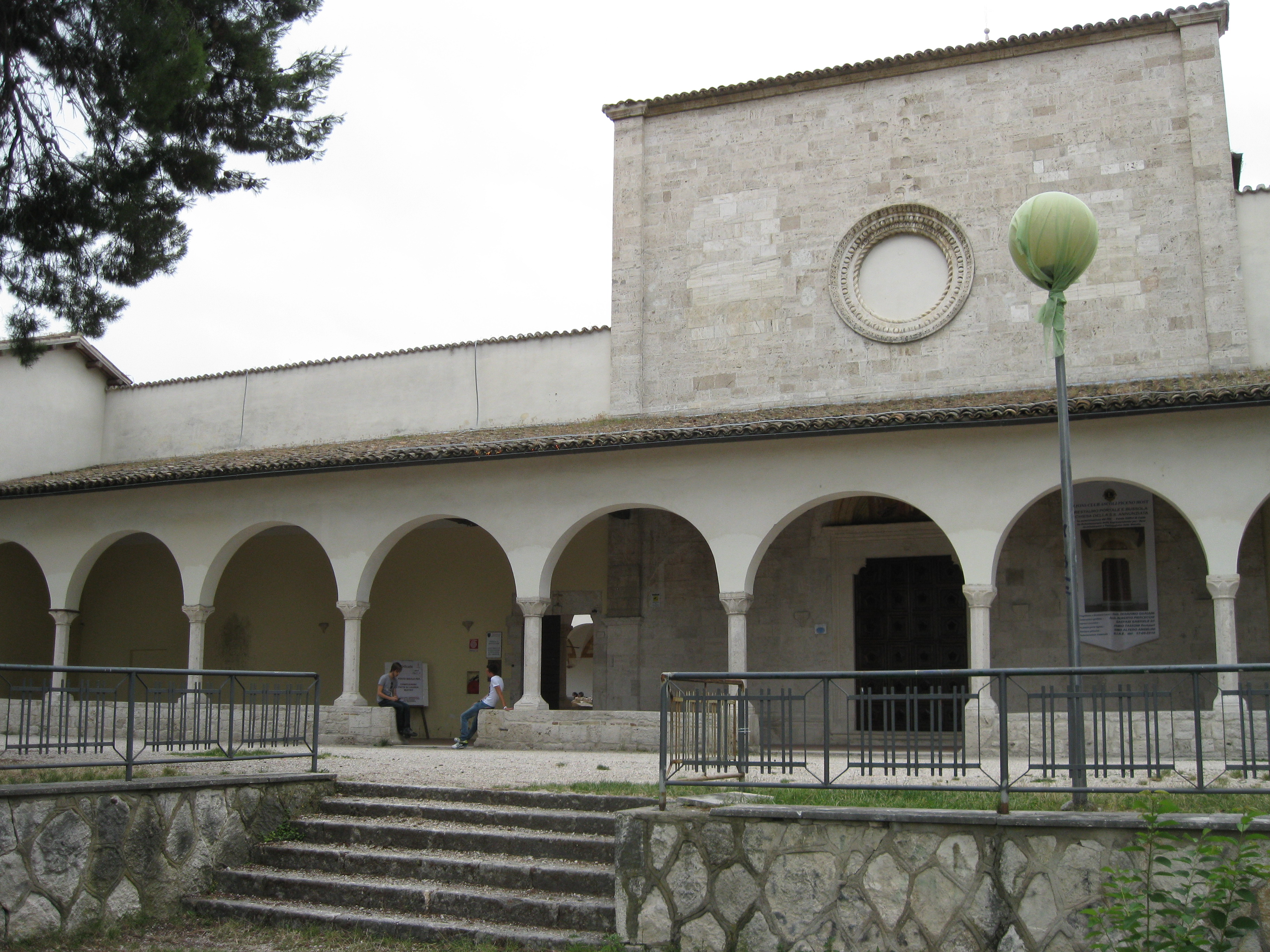 Arkitektskolen, Ascoli Piceno, Italien